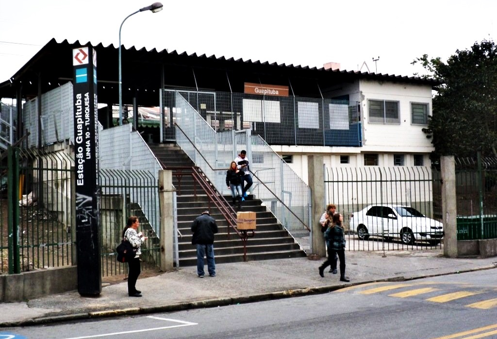 Entrada da Estação Guapituba, em Mauá da Linha 10 da CPTM.